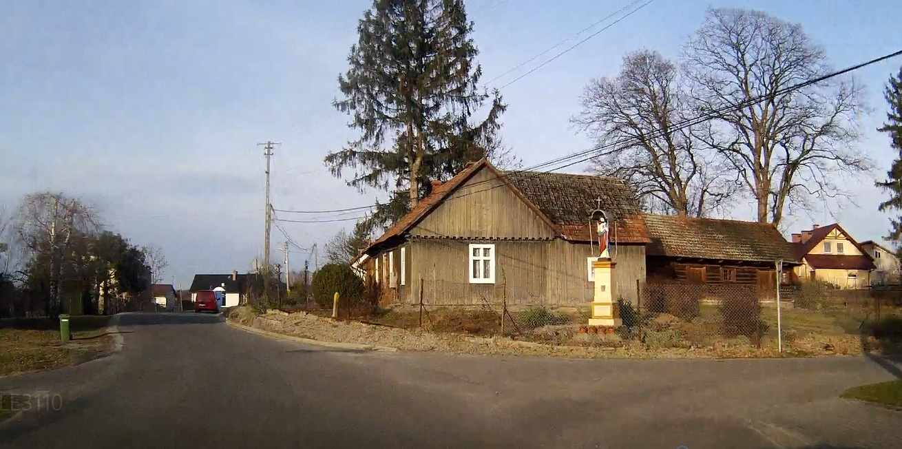 Koszyce Małe zabytkowa zagroda Czosnyków i figura Serca Pana Jezusa w miejscu dawnej karczmy u zbiegu ulic Wolskiej i Lipowej. Ozdobna snycerka na ścianach szczytowych domu. fot.2019.03.07